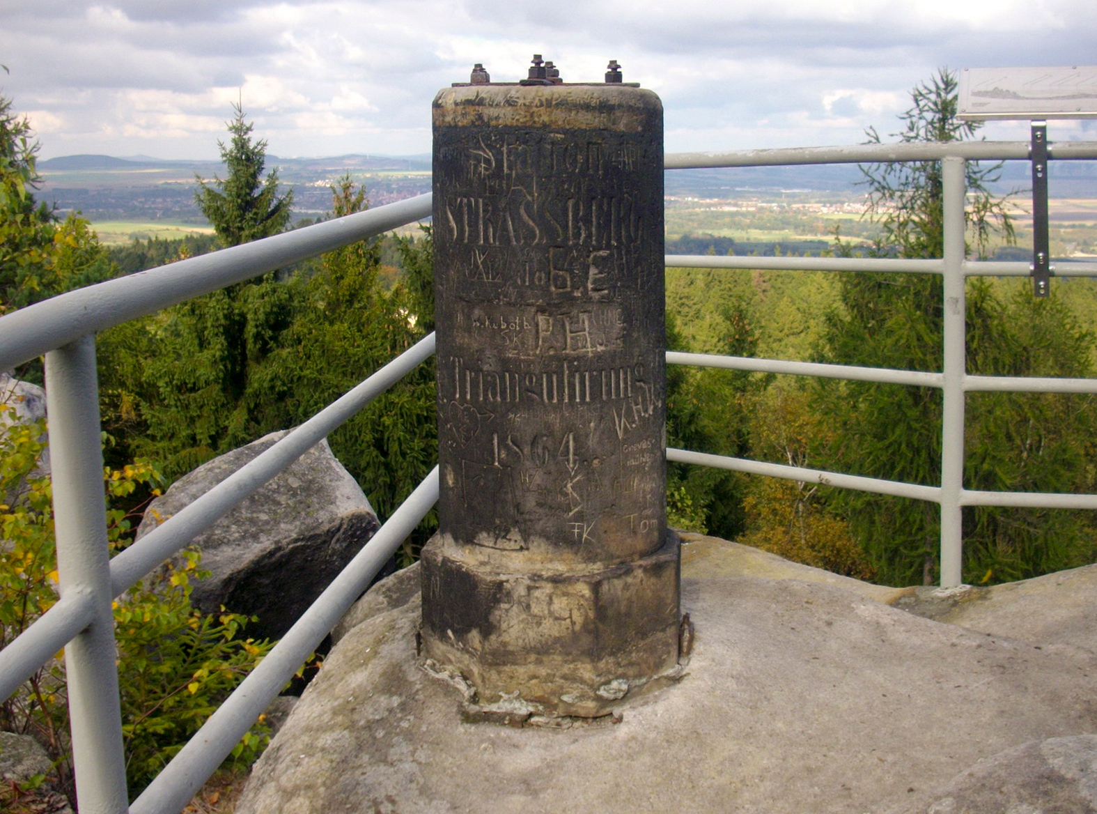 Königlich-Sächsische Triangulation Station 39 Strassberg Vermessungspunkt II. Ordnung